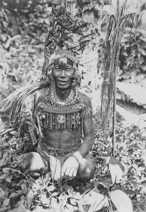 foto. Portret van een Mentawei medicijnman op Siberoet